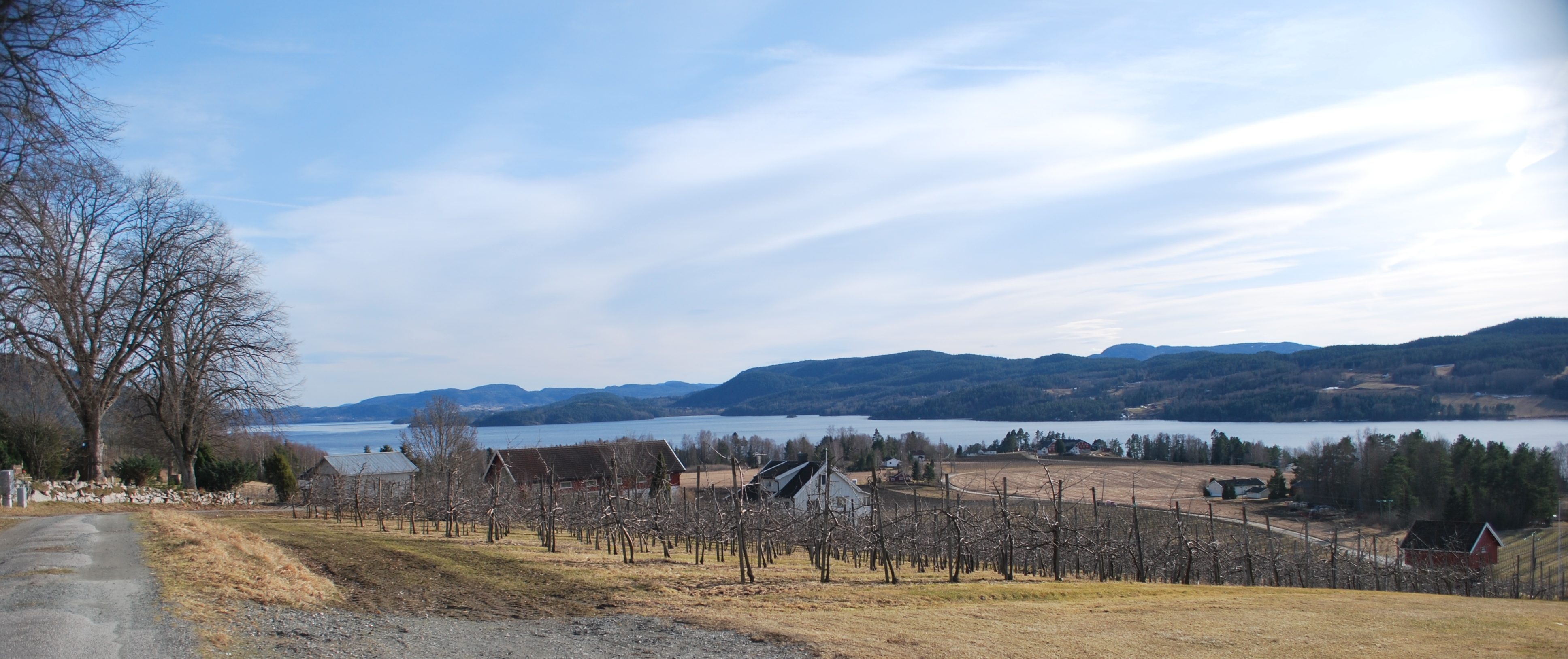 The lake Norsjø, seen from Nes Church (Norw. kirke) towards Ulefoss, Telemark county, Norway Norsjø sett fra innkjørselen til Nes kirke, mot Ulefoss